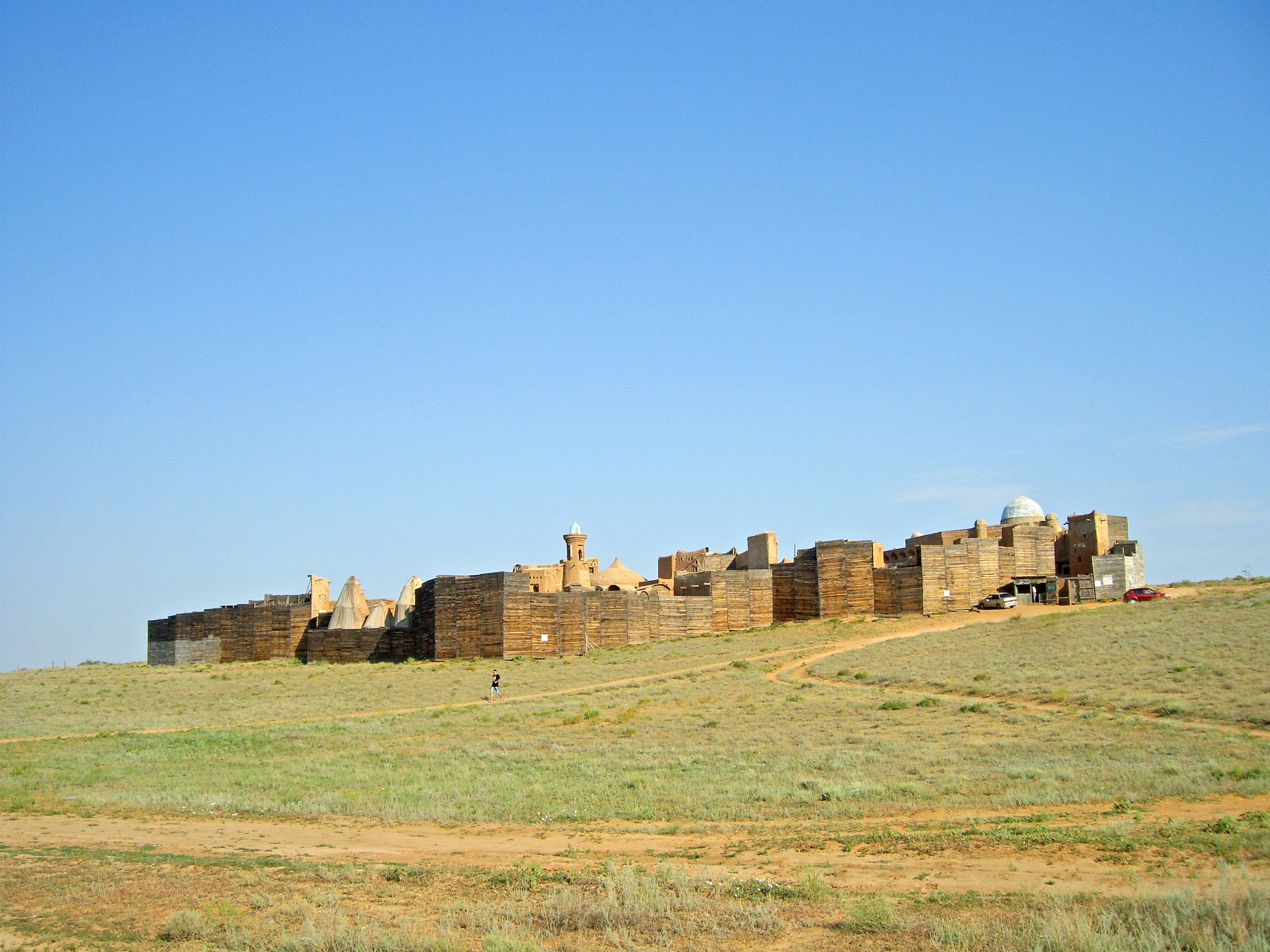 Декорации, выстроенные для фильма «Орда»